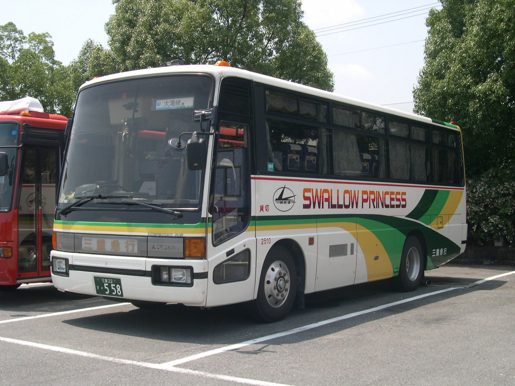 姫路城貸切バス駐車場にて 2003-8-2